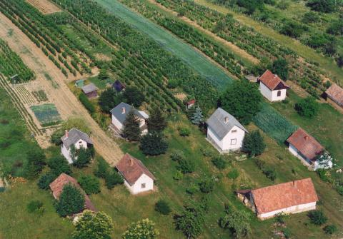 Nagykutas, Hungary, aerialphotography